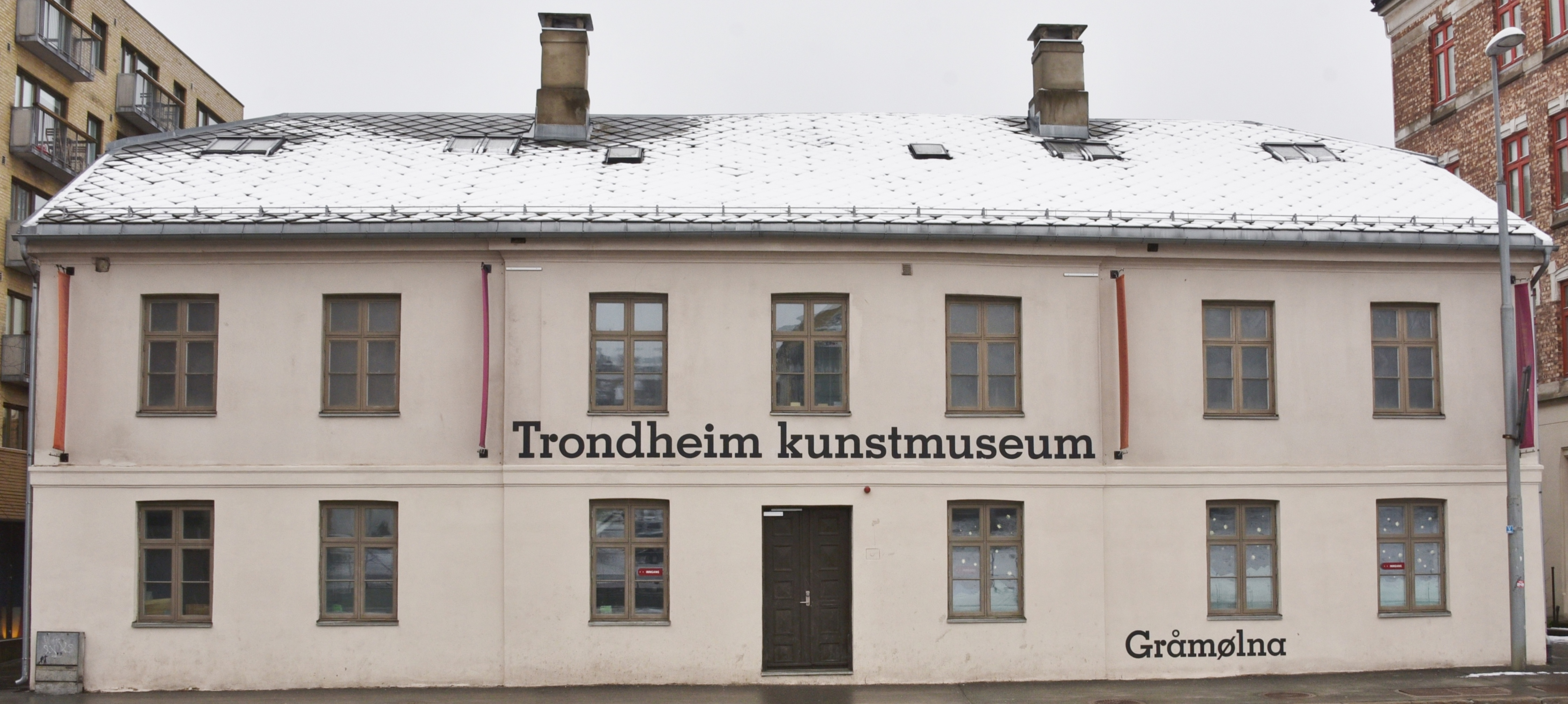 Trondheim Kunstmuseum, Gråmølna, part of the Trondheim Kunstmuseum